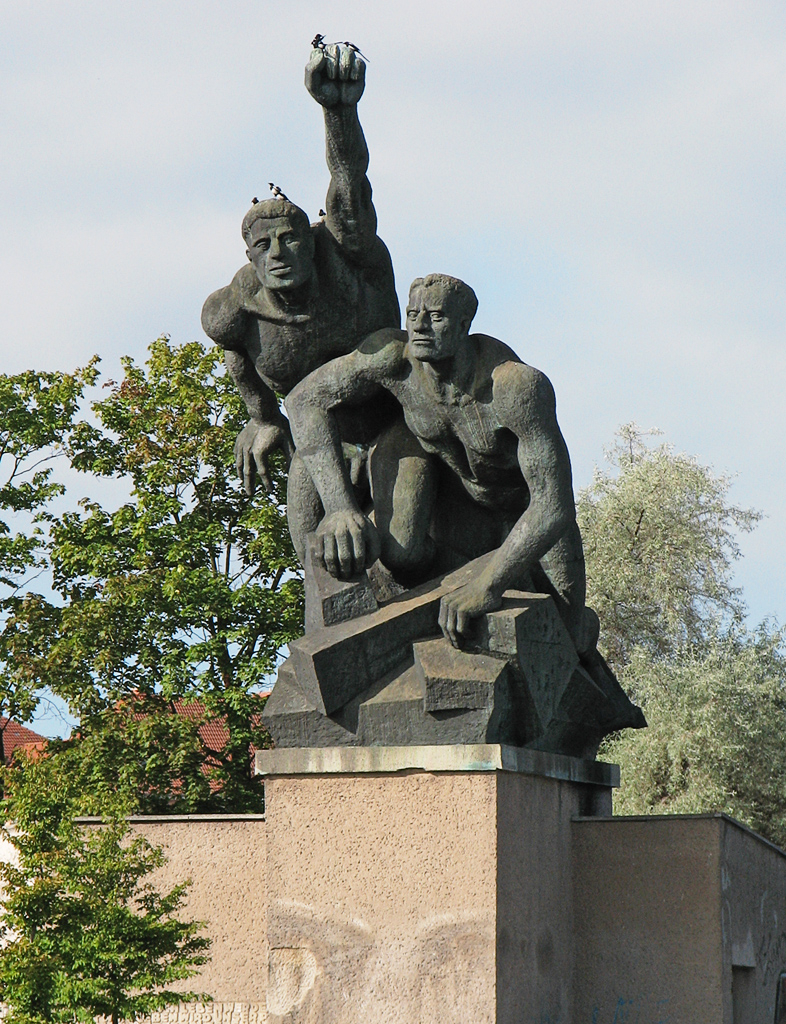 Beschreibung: Gedenkstätte revolutionärer Matrosen in Rostock / Ende des Stadthafens Fotograf: Darkone, 31. August 2005